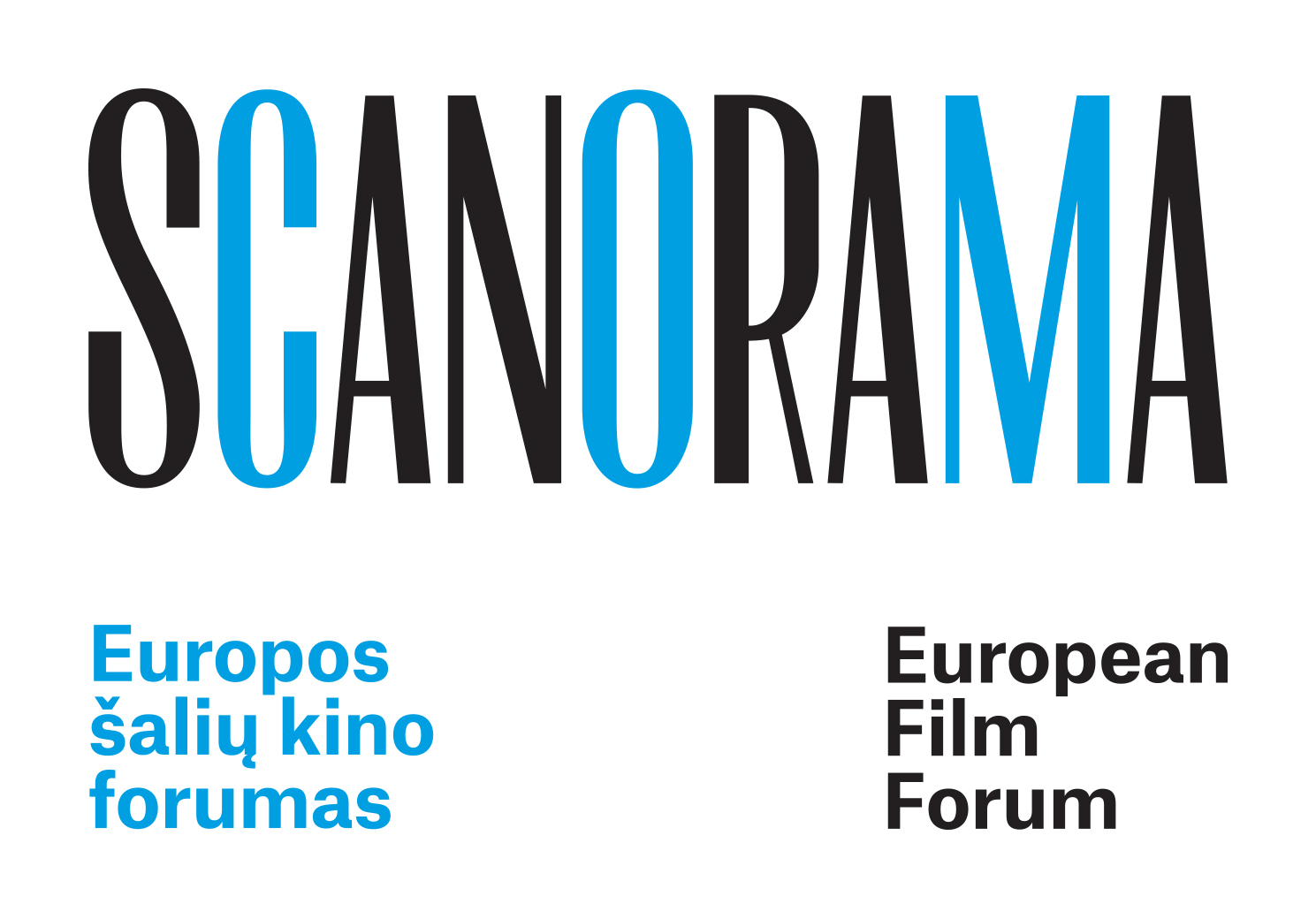 Festivalio logotipas